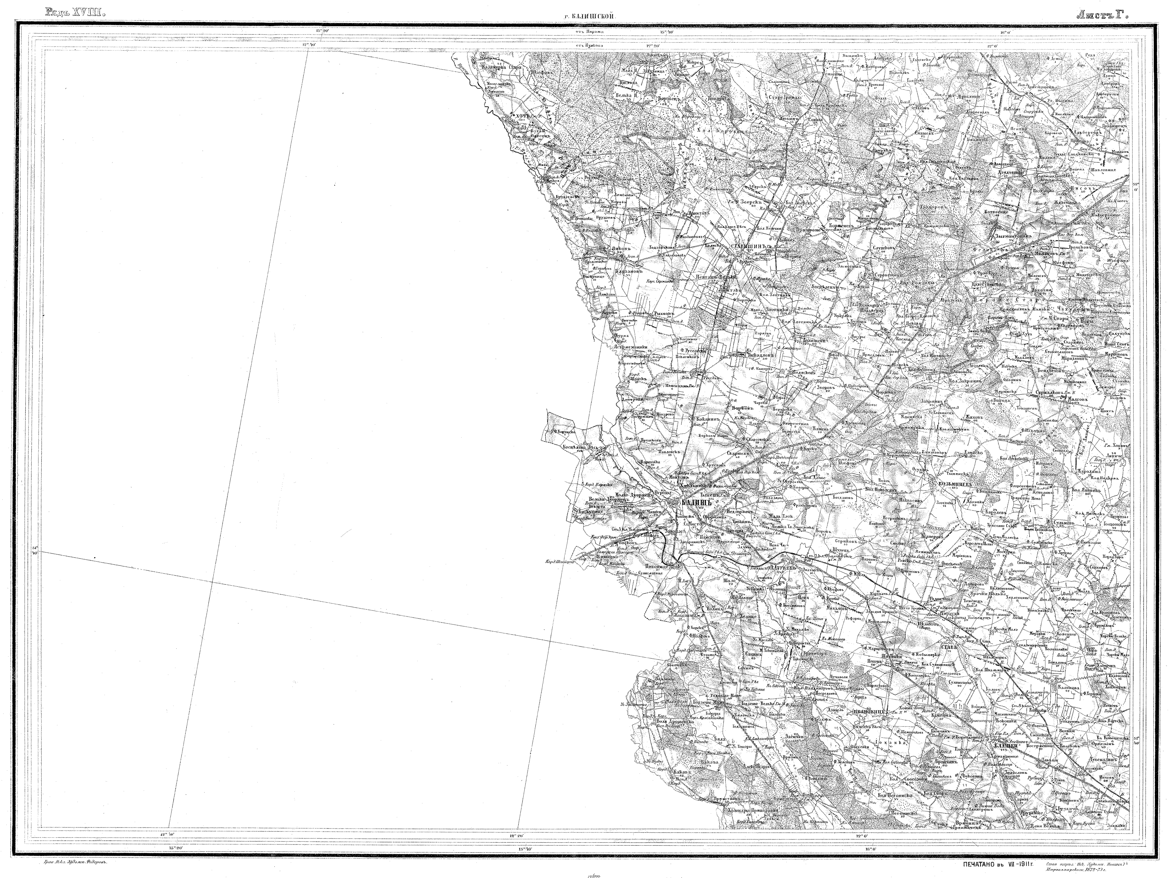 Mapa topograficzna okolic Kalisza z czasów zaboru rosyjskiego; rejon na zachód od granicy z Prusami nie został narysowany.